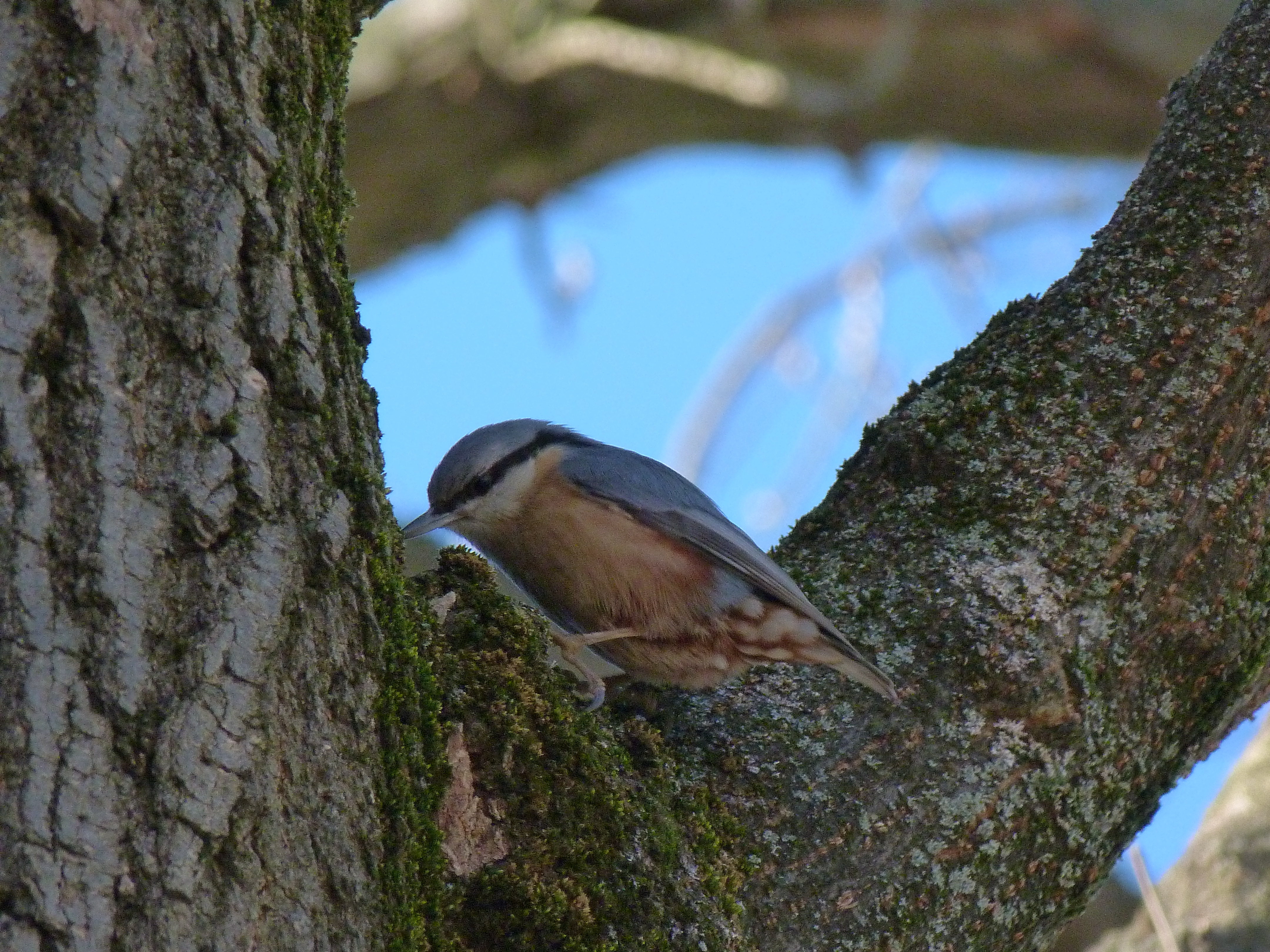 Csuszka